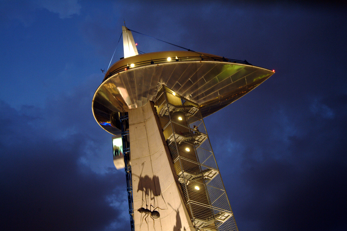 Torre de observación del Parque de las Ciencias (Granada, España)